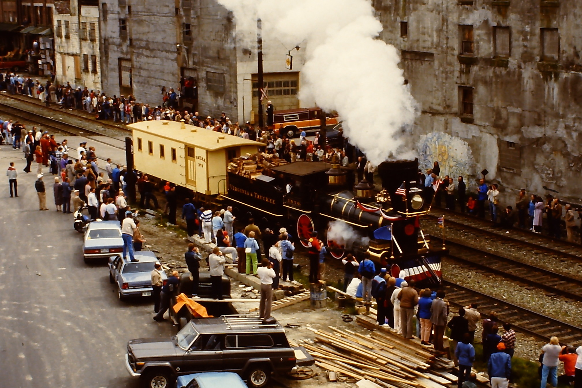 Virginia & Truckee Nummer 22 Inyo auf der SteamExpo 86